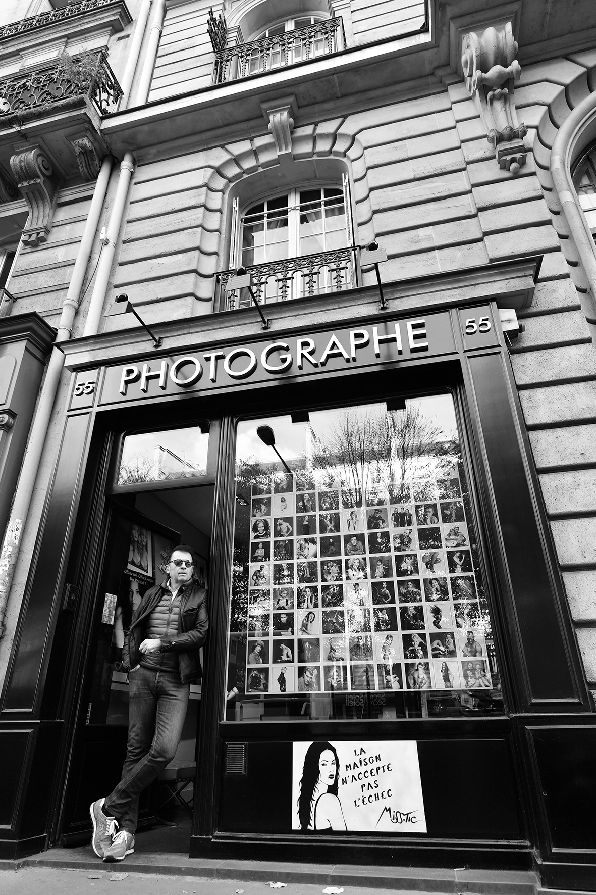 Gilles Dacquin devant son studio boulevard des Batignolles à Paris